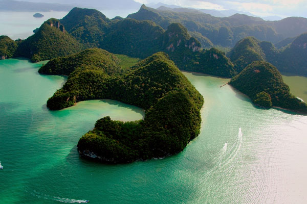 Dayang-bunting-lake